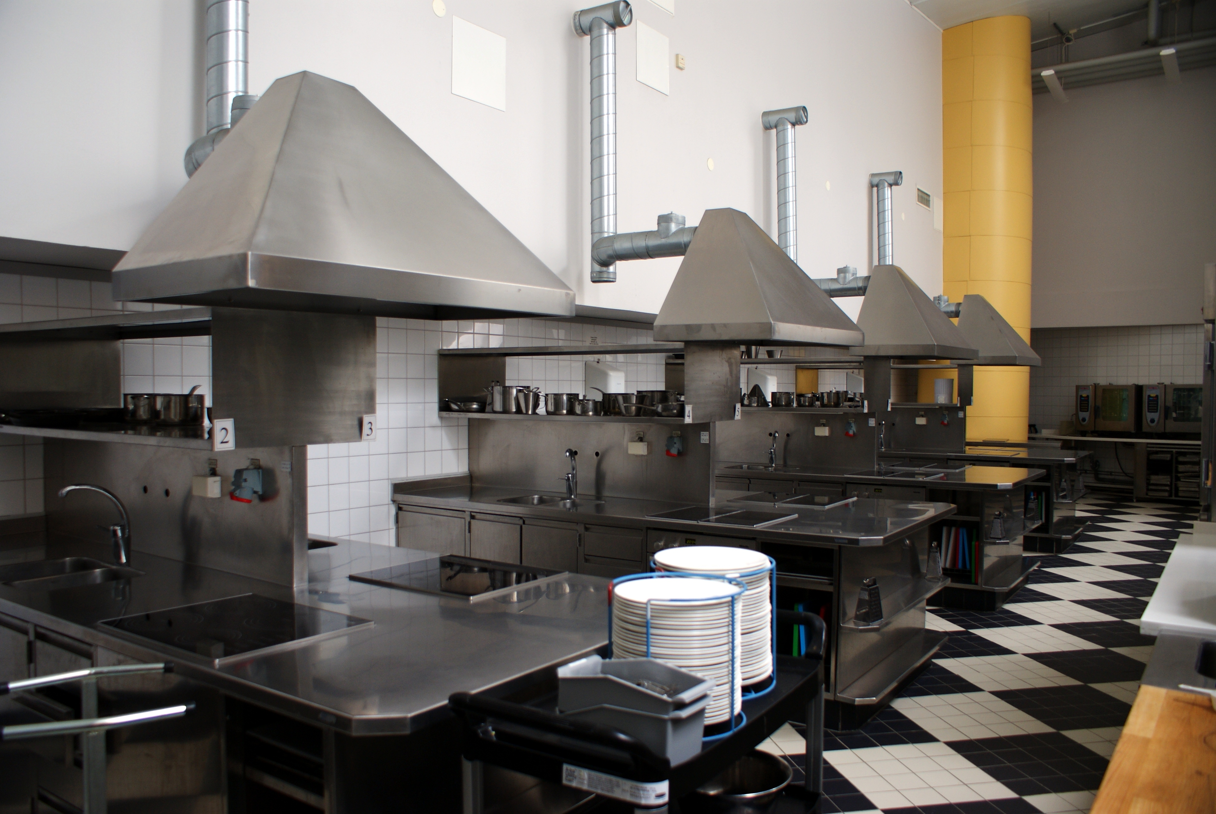 Undervisningssal i Måltidens hus i Grythyttan.